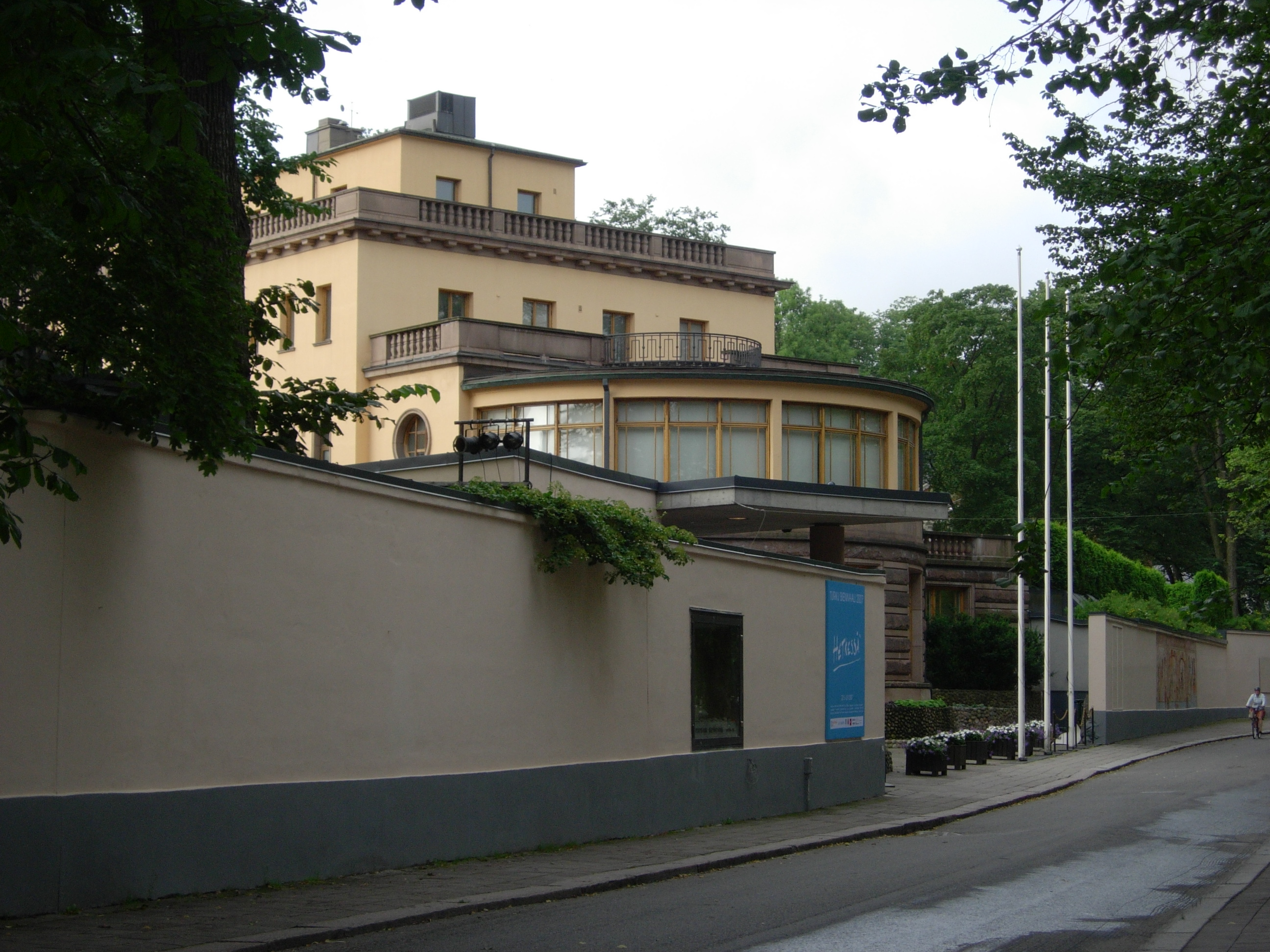 Aboa Vetus & Ars Nova -museo.